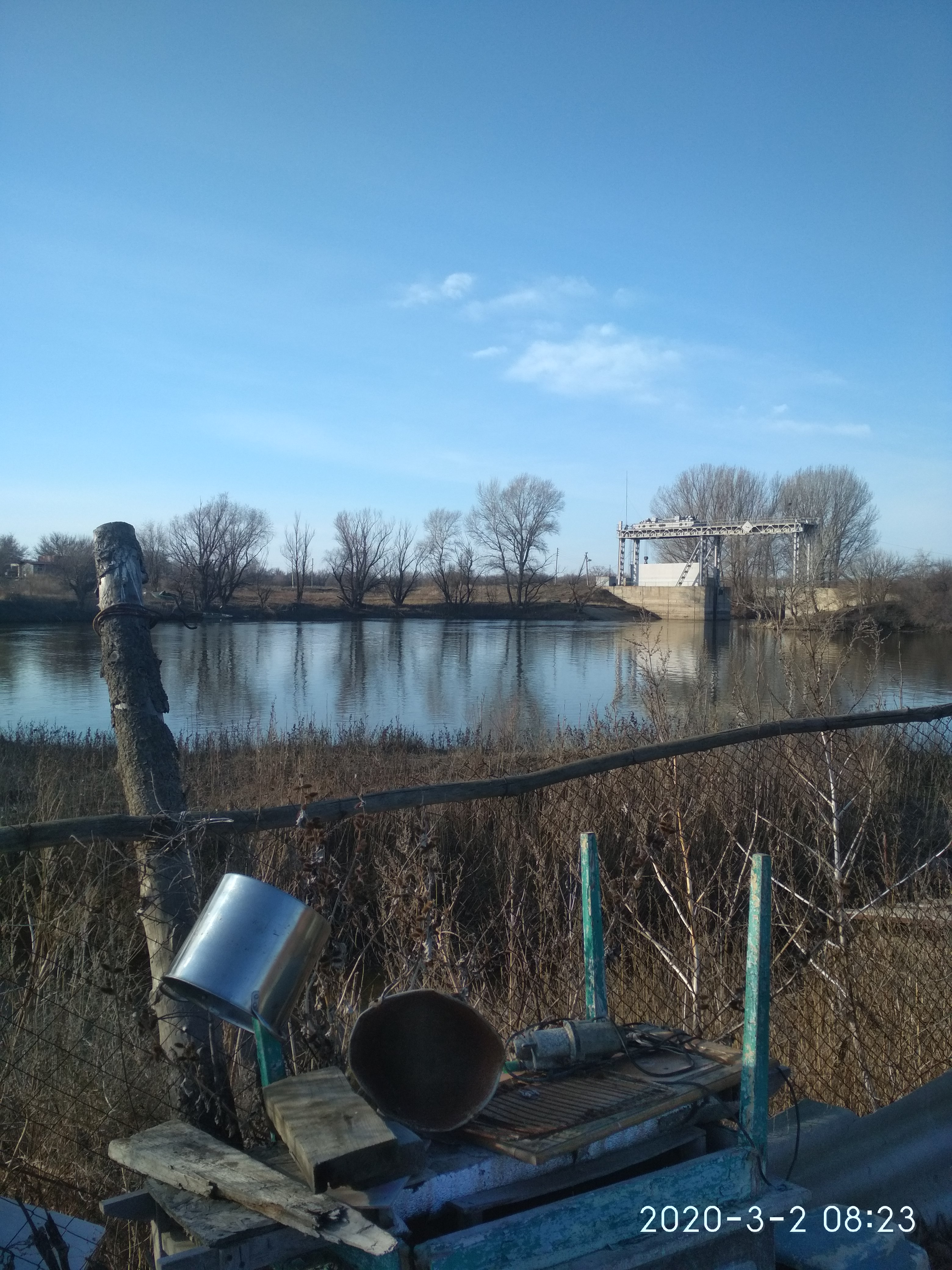 Нохчийн: Рыча - Ийдалан га